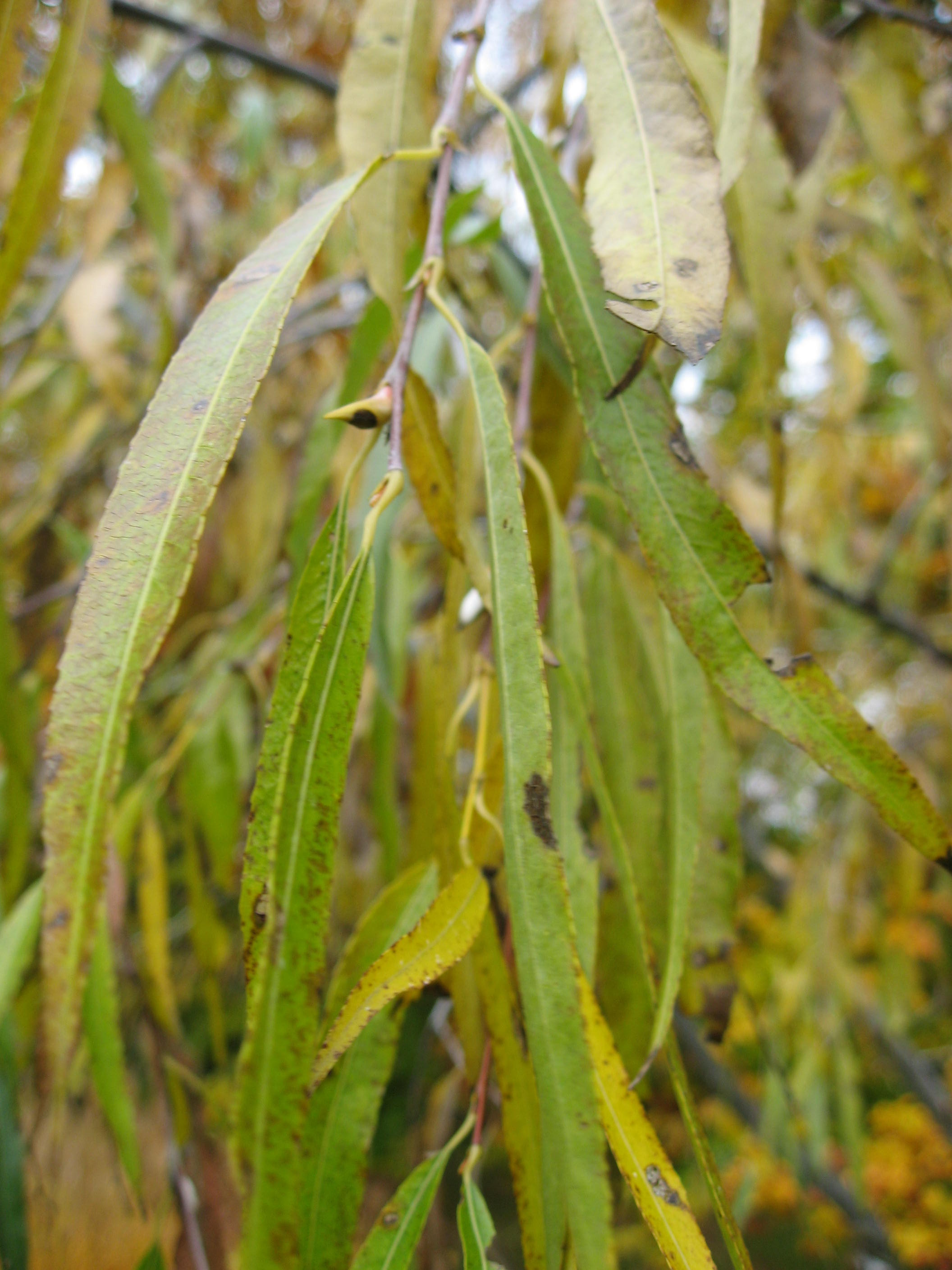 Salix udensis 'Sekka' in Parc floral de Paris Map: 48° 50' 19" N 2° 26' 33" E